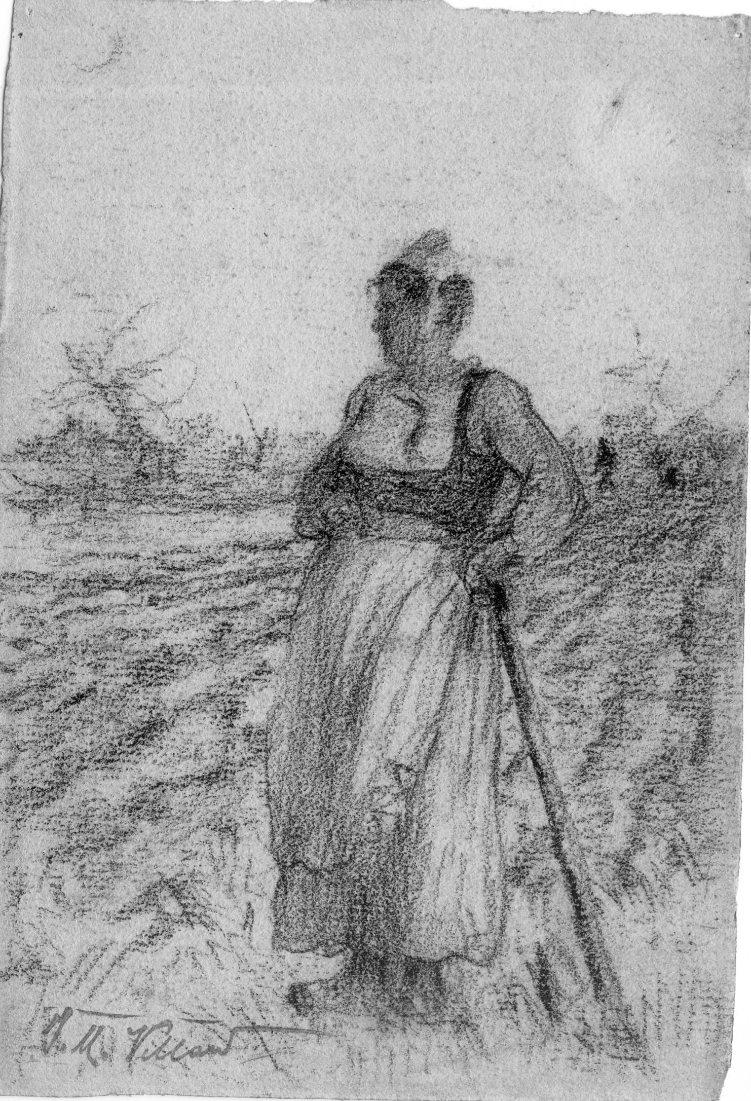 Fusains, crayons ou encres réalisés sur des papiers volants de petite dimension (le plus souvent 10x15 cm) récupérés (dos de cartes de visites, dos de faires part coupés en quatre ou de listes de notes et classement de ses élèves, etc.